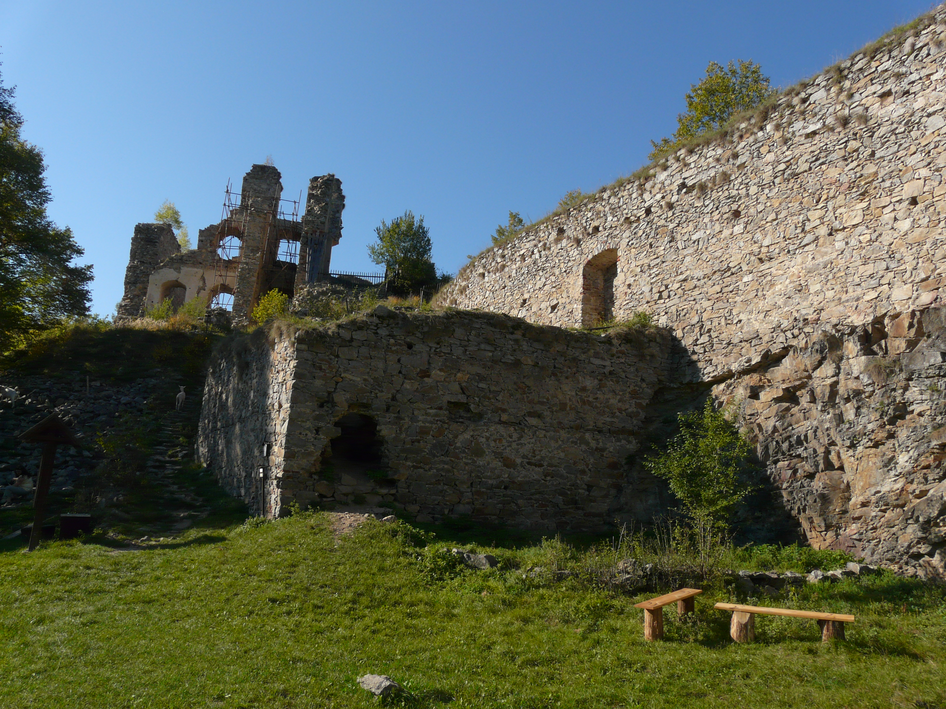 Dívčí kámen, zřícenina rožmberského hradu